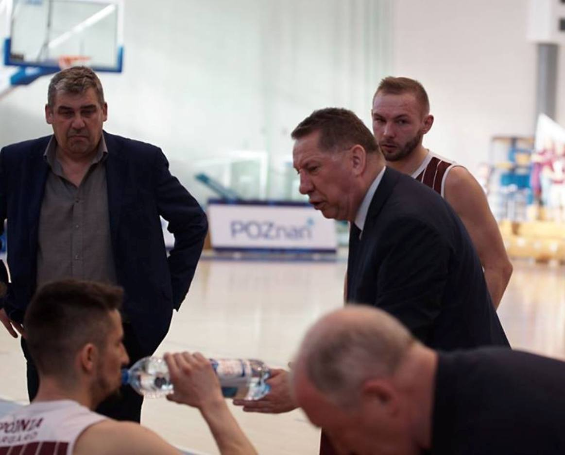 Trener Spójni Stargard Krzysztof Koziorowicz w Poznaniu (21.04.2018)